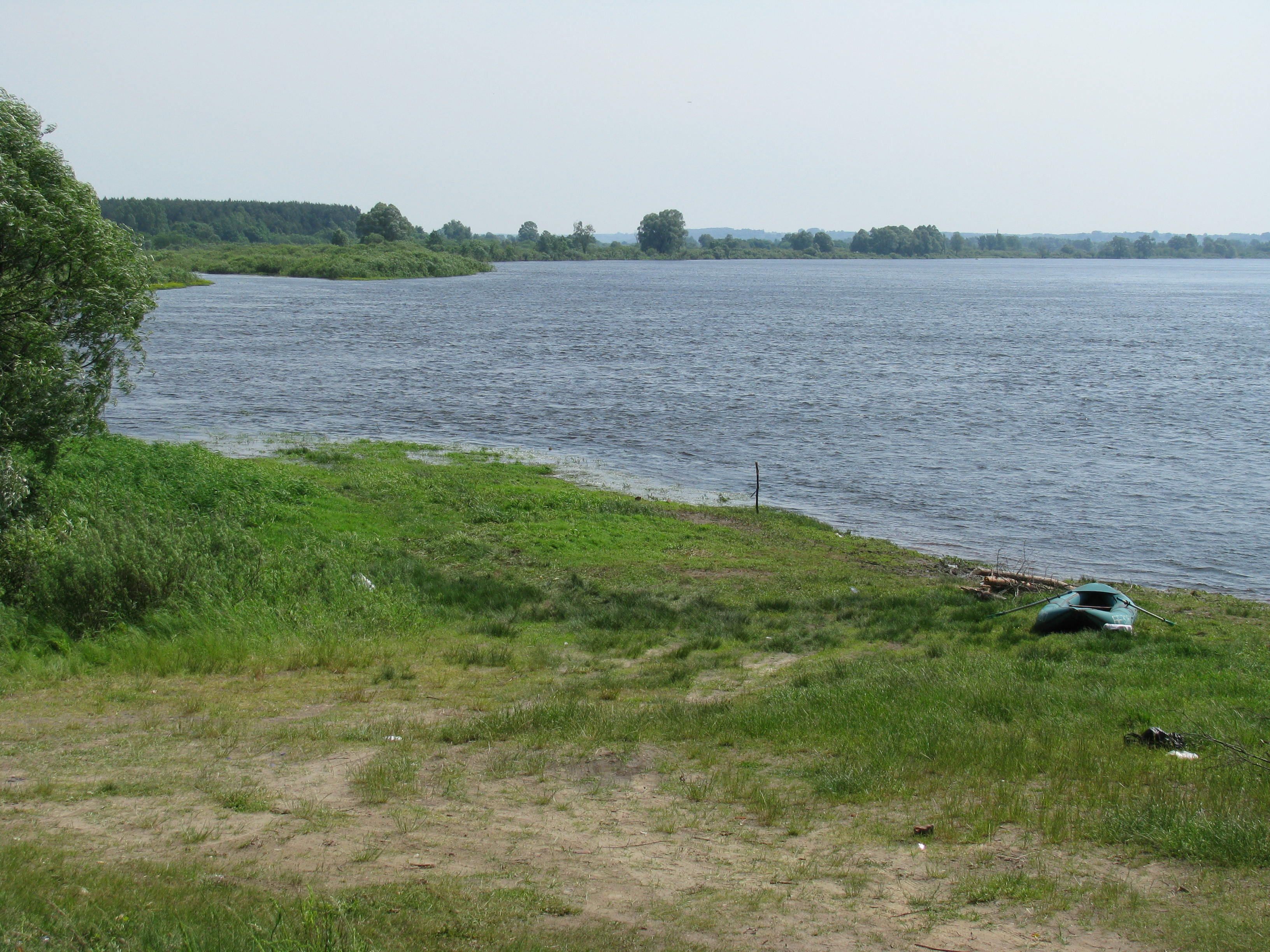 Любимое место отдыха и рыбалки. С самого детства и ло сих пор там хорошая рыбалка и очень красивая природа. Река Днепр. Когда то во времена моего детства таи стояли жилые дома, а теперь Днепр с каждым годом всё больше и больше обрезая нашу территорию, вымывает лишь камни с погребов и фундамента былых строений.